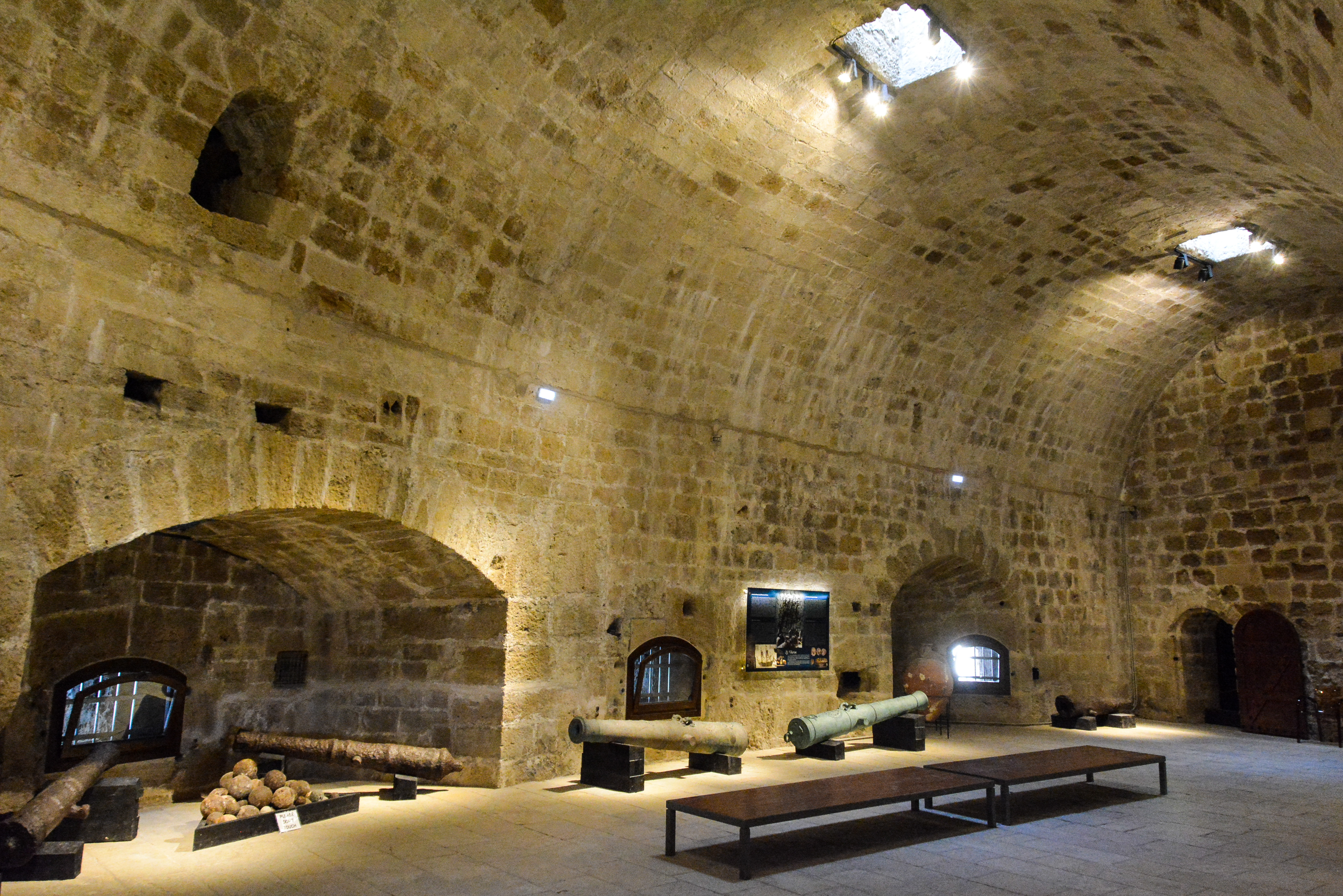 Θαλάσσιο Φρούριο ενετικού λιμένος Ηρακλείου (Κούλες)«Κούλες»